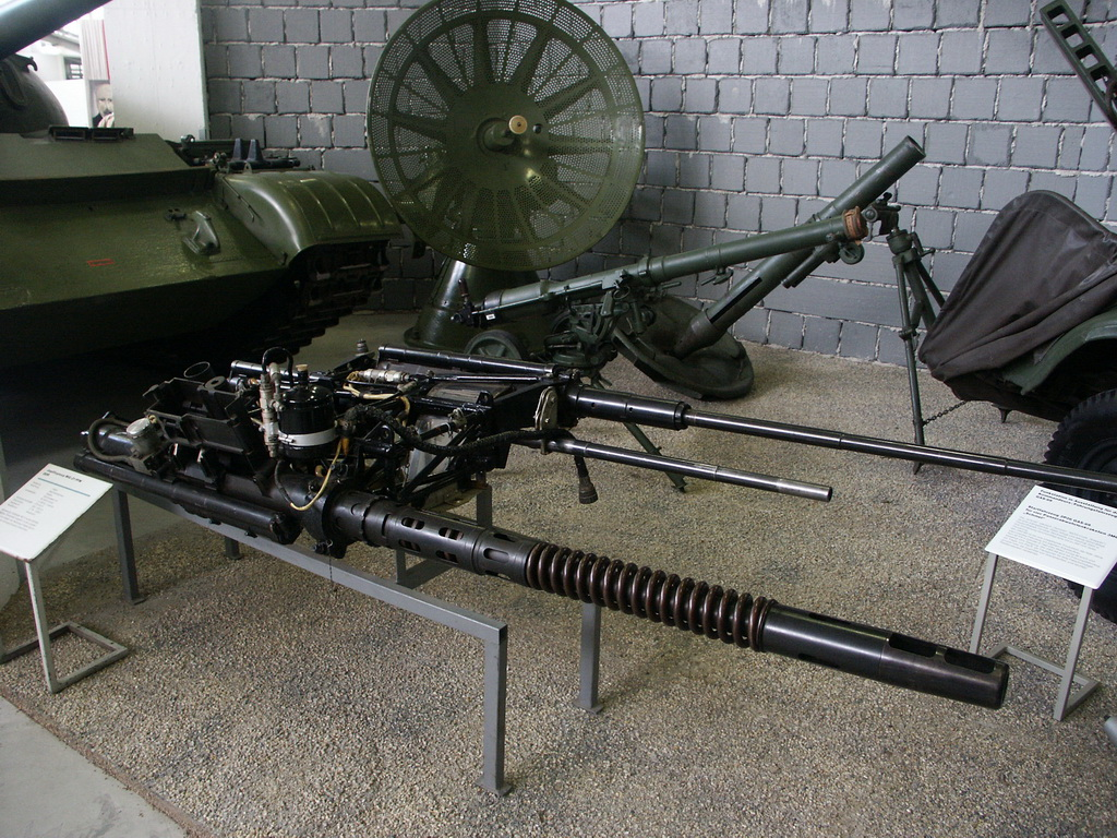 Militärhistorisches Museum der Bundeswehr, Interimsausstellung Beschreibung: Im Vordergrund: Bordwaffenträger mit 37 mm Flugzeugkanone NR 37 und zwei 23 mm Flugzeugkanonen NR 23 eines MiG-17F-Jagdflugzeuges